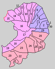 長崎県南高来郡の町村制時点の町村。